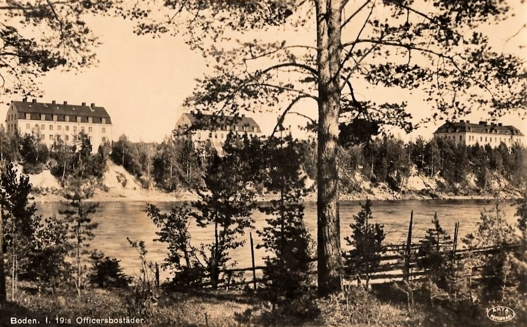 Officersbostäder vid Norrbottens regemente i Boden.